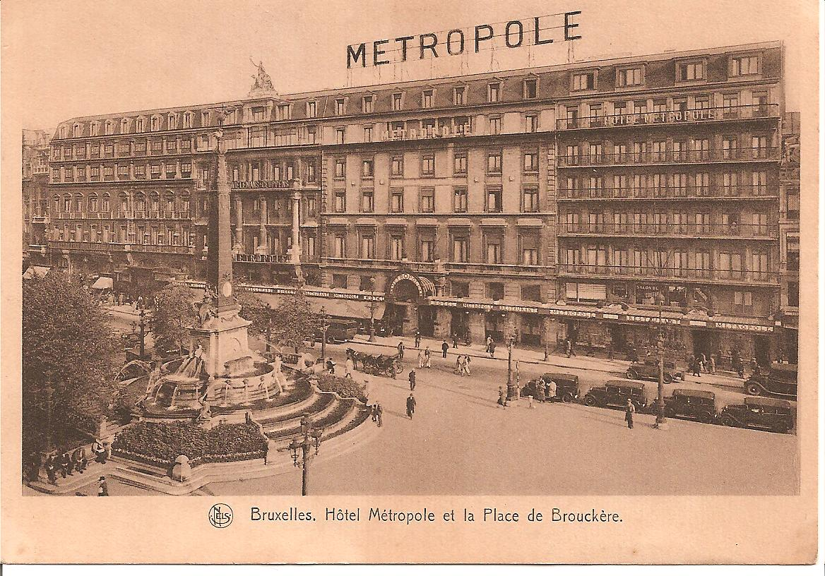 Hotel Metropole in Brussels, Belguim in the 1920's